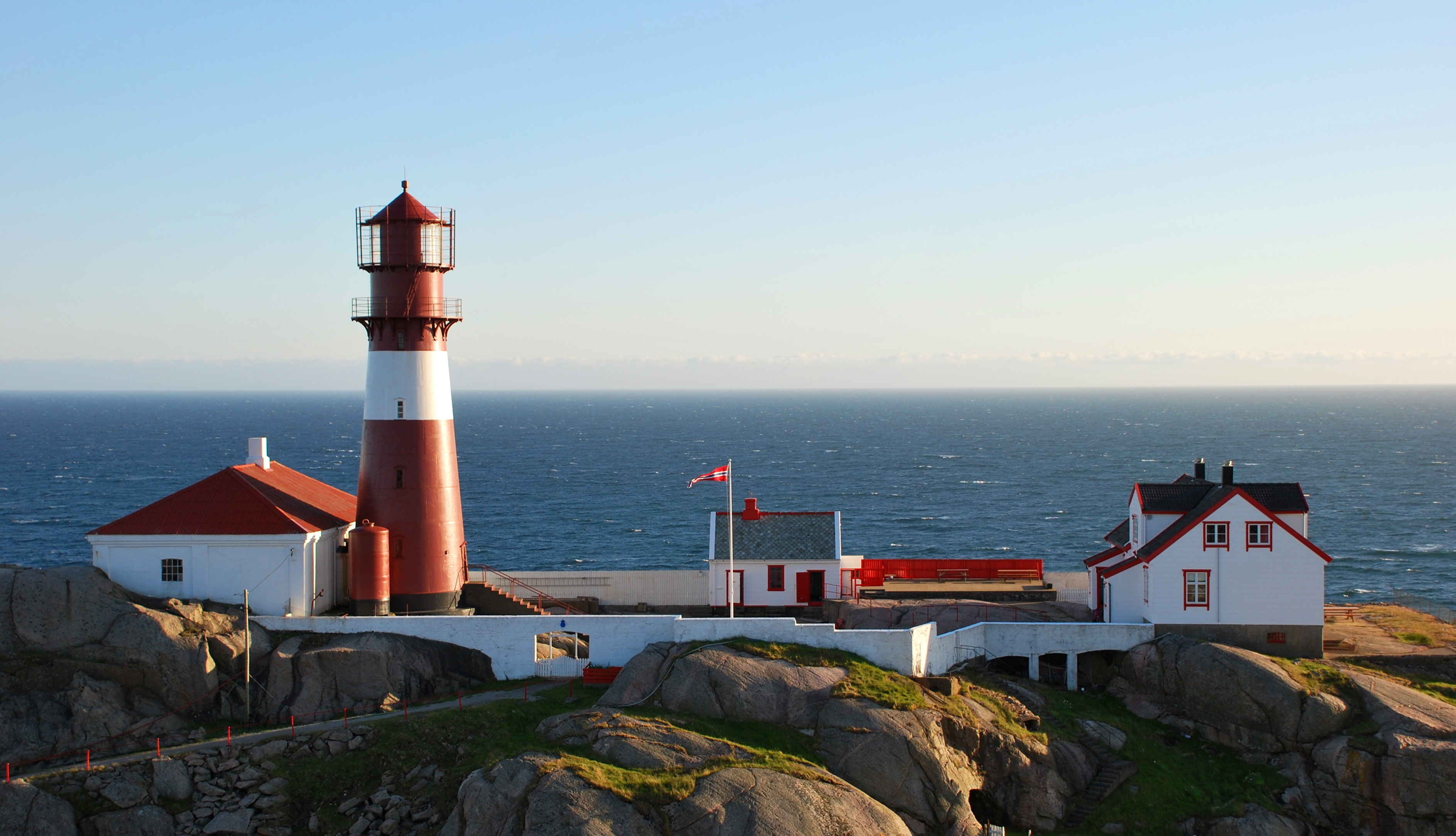 Ryvingen fyr